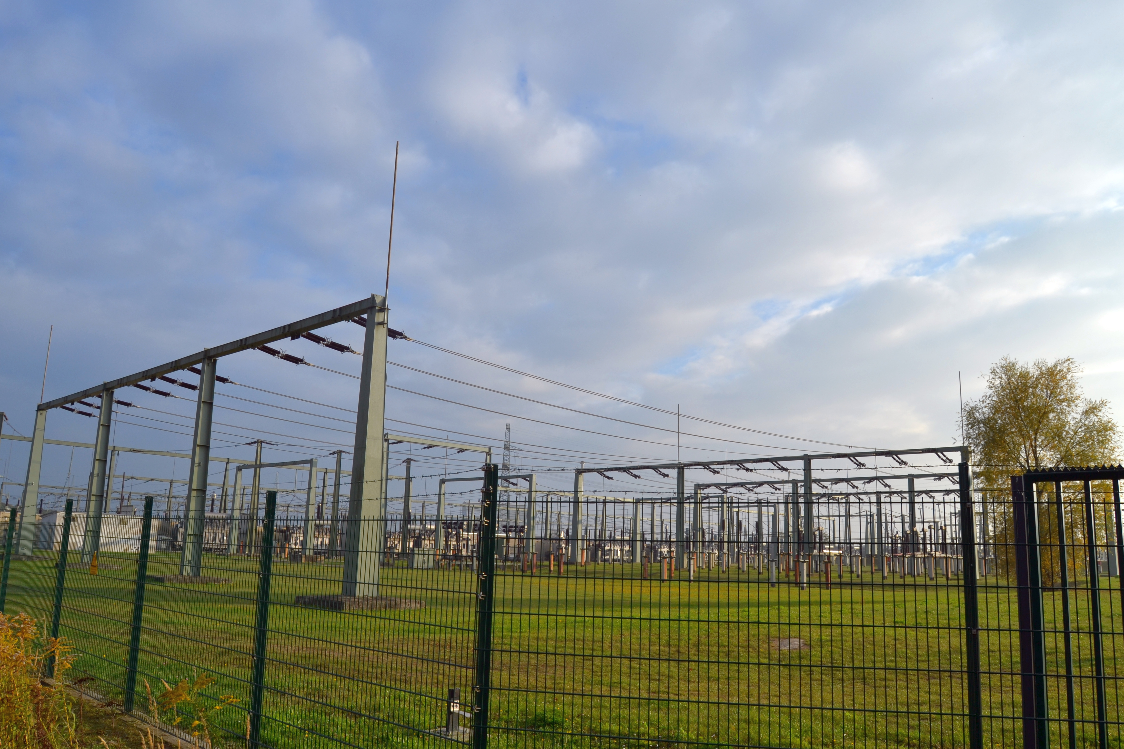 Umspannwerk von Neuenhagen bei Berlin.